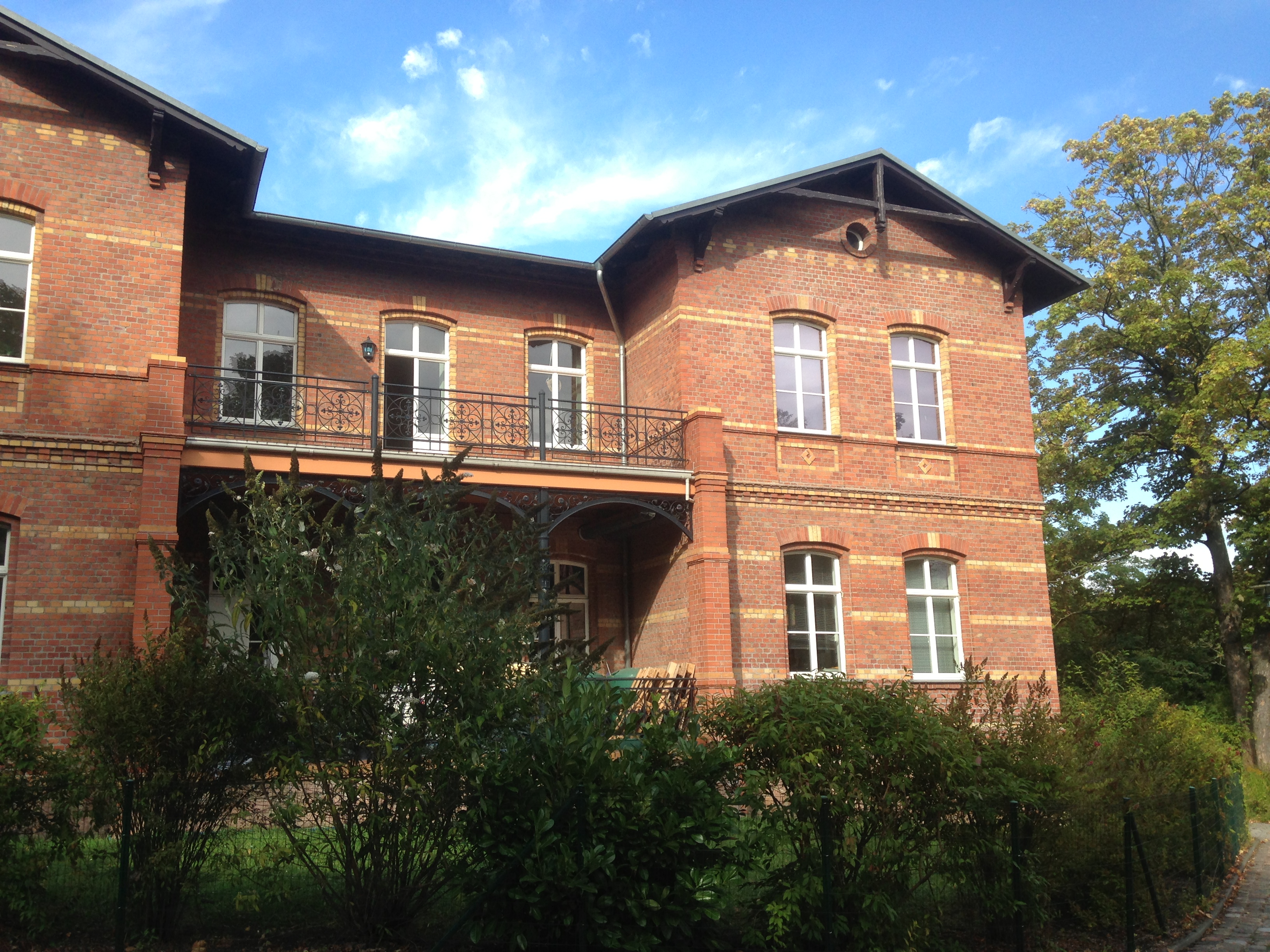 Renoviertes Gebäude ehem. Irrenanstalt Nietleben, Boardinghaus Weinberg Campus